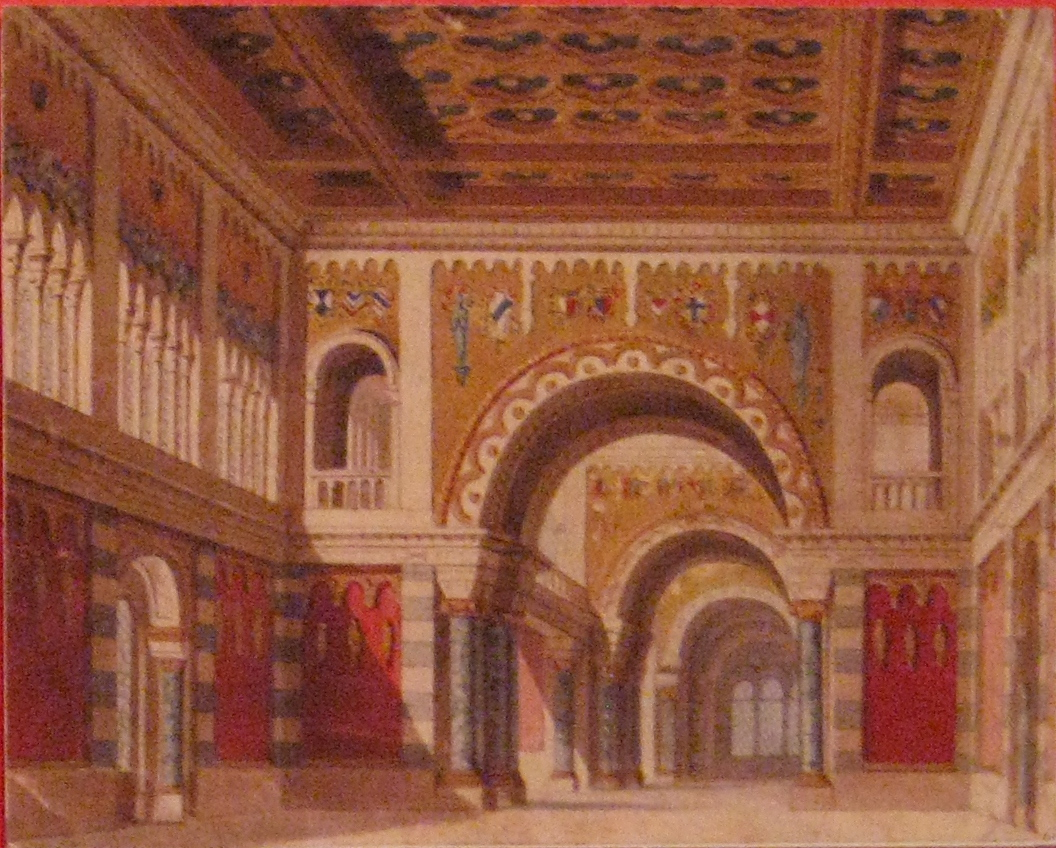 Simone Boccanegra. Set design realized on commission of Ricordi & c. by Girolamo Magnani for the premiere at Teatro alla Scala, March 24, 1881